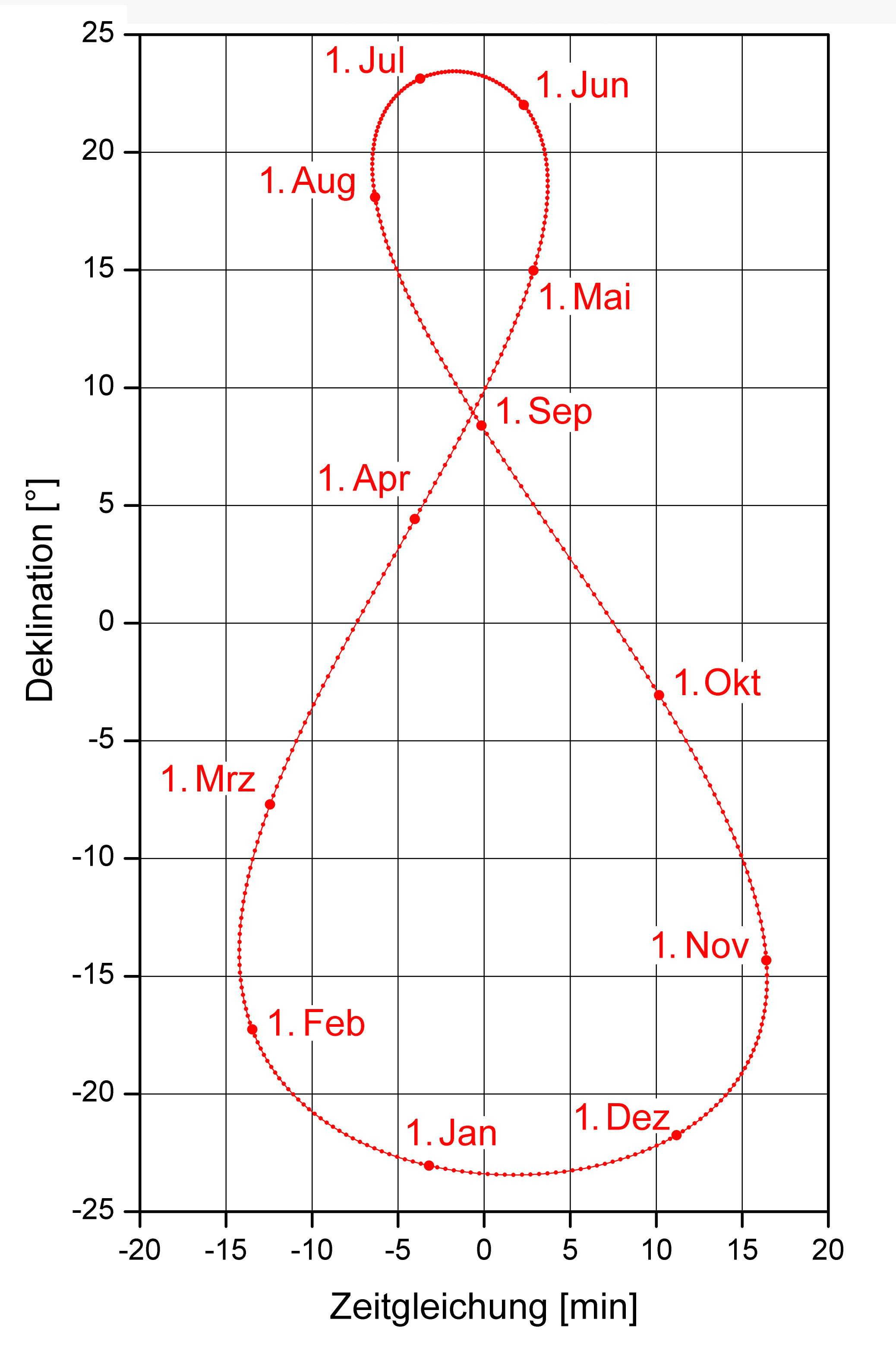 Zeitgleichung: als Analemma-förmiger Graph